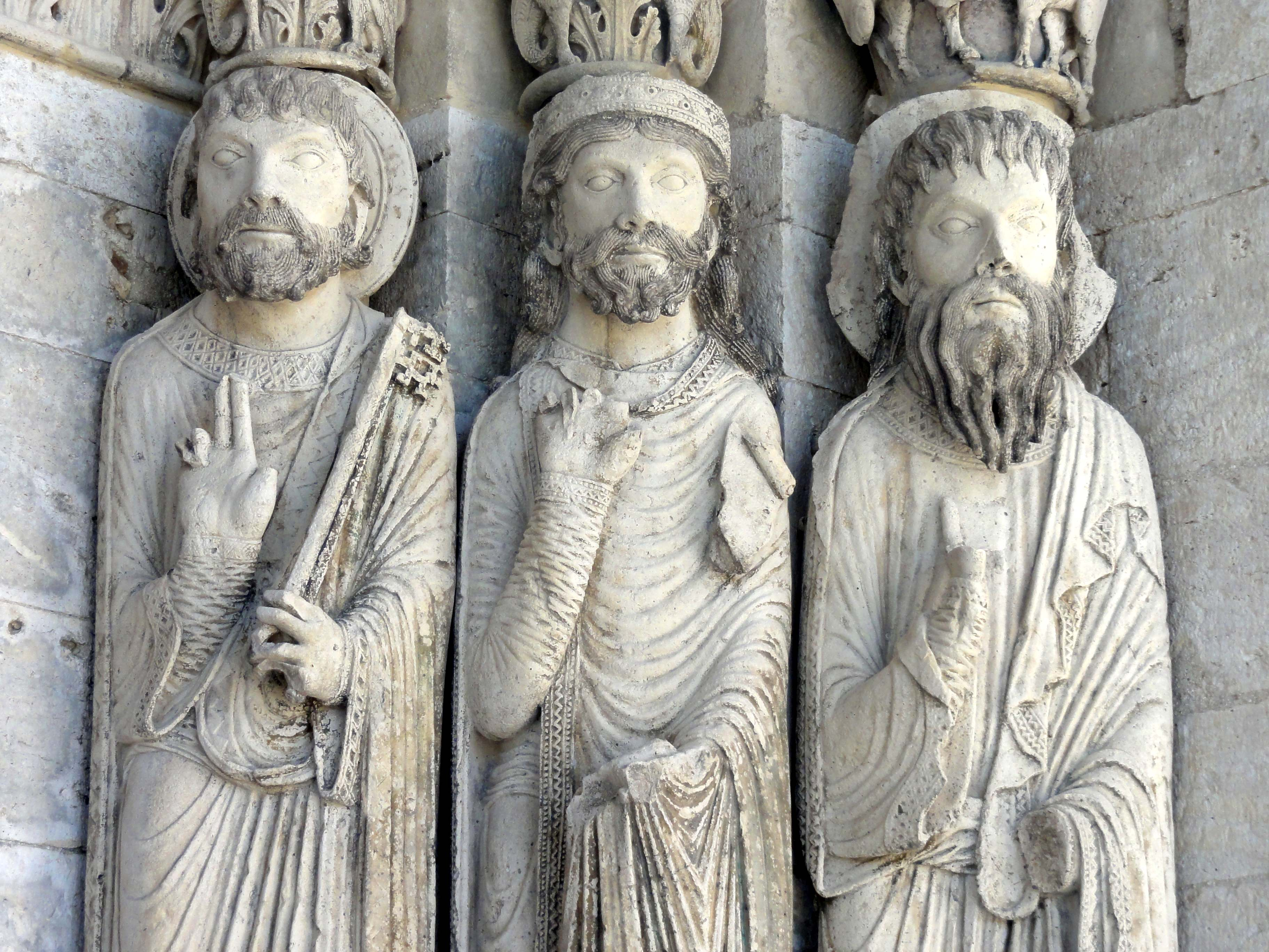 Portail et porche de l'église Saint-Loup, vers 1160 - voir le titre du fichier.